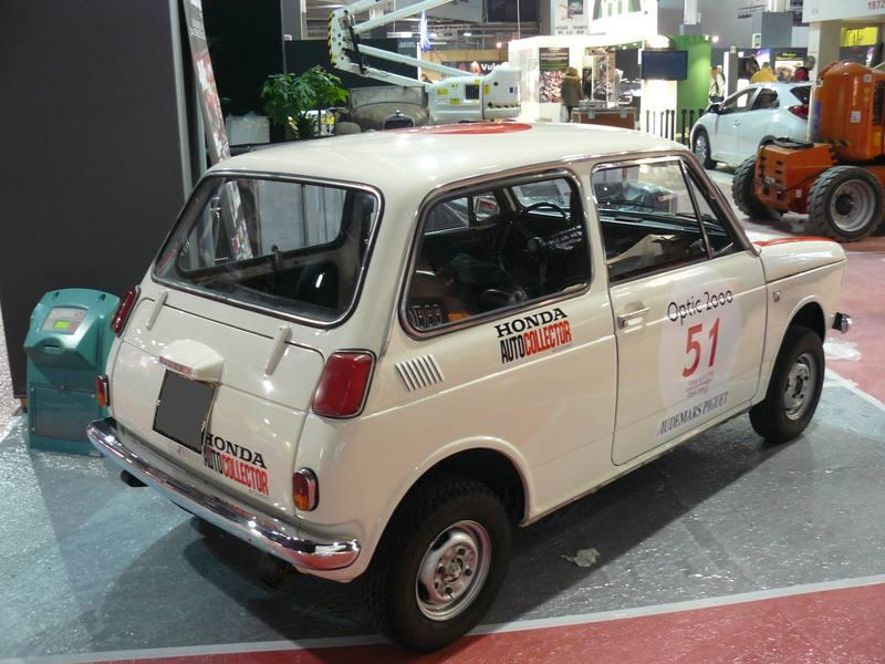 Retromobile 2012